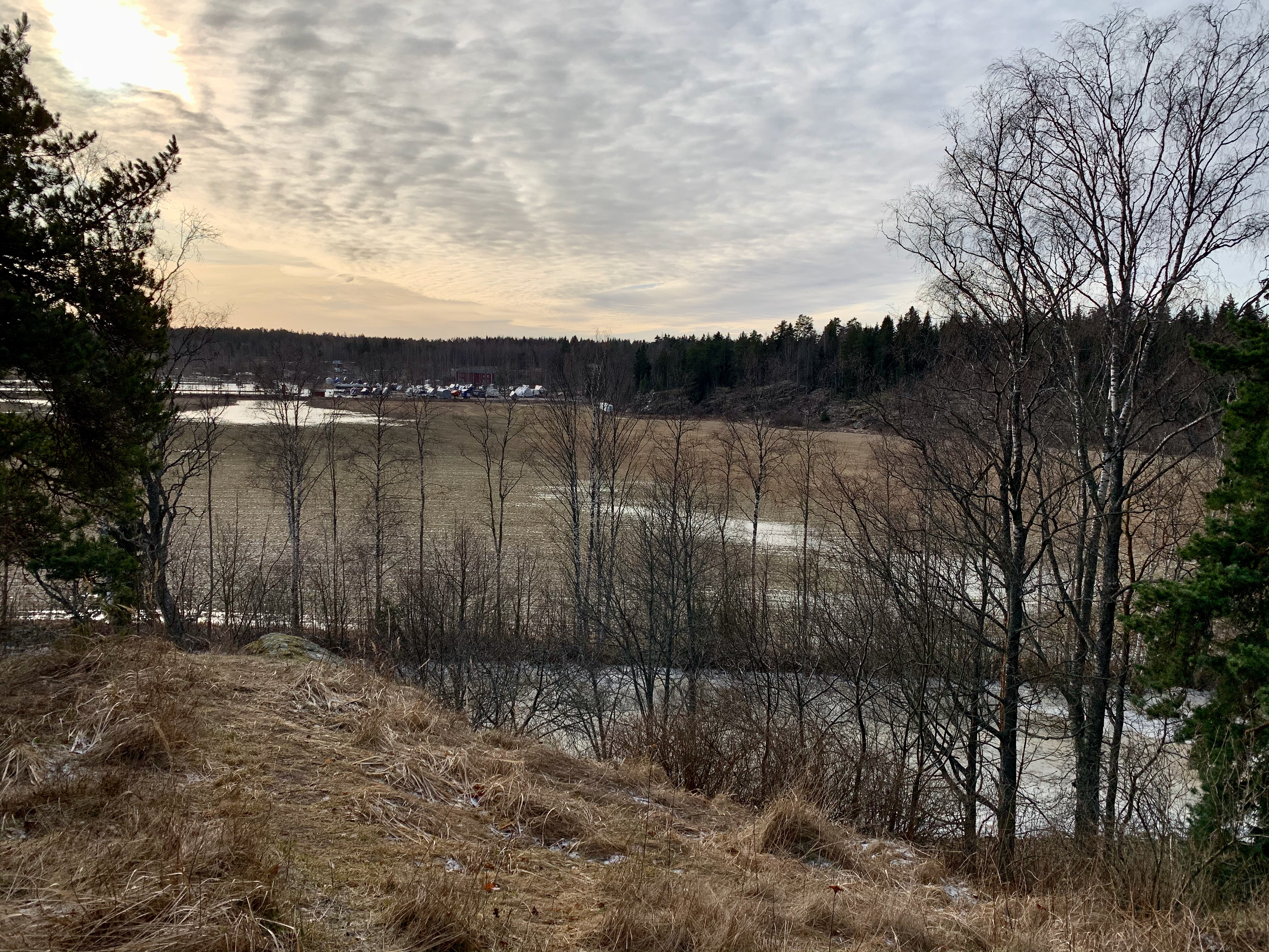 Замок Сипоо